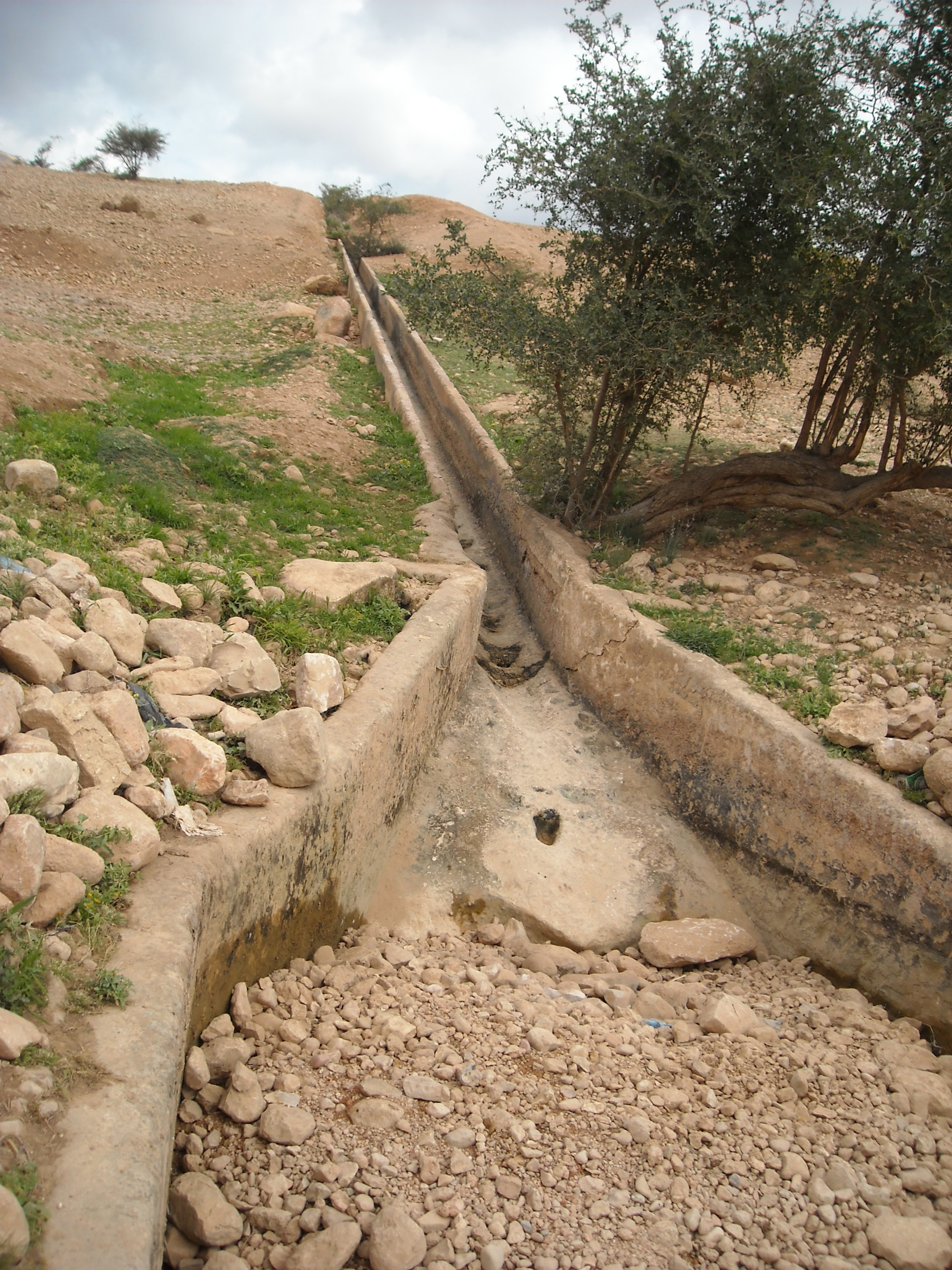 אמת המים היבשה ממעיין עוג'ה